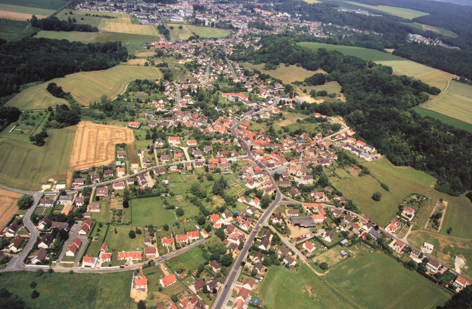 Vue d'avion de Mogneville, Canton Canton de Liancourt, Arrondissement de Clermont, Département de Oise, Picardie, France